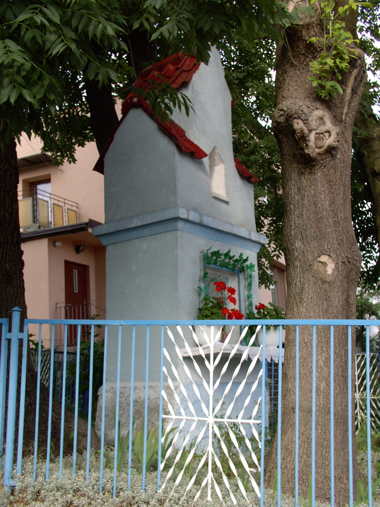 Kapliczka na Likusach, Olsztyn